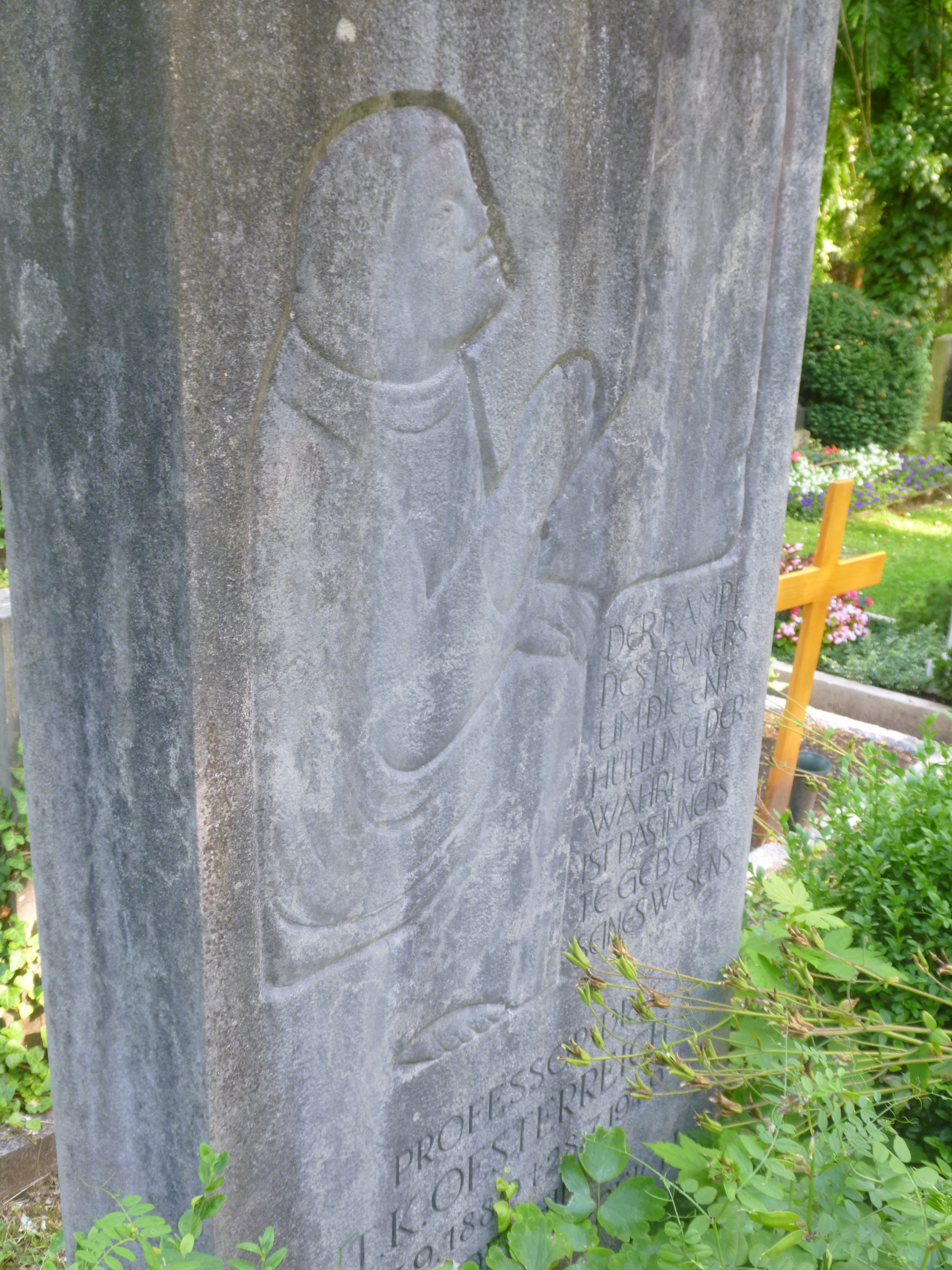 Grab von Traugott (Konstantin) Oesterreich auf dem Stadtfriedhof Tübingen